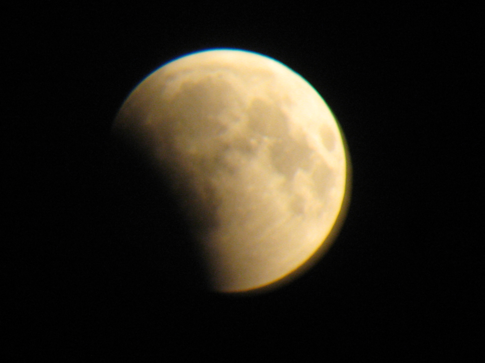 Kuuvarjutus augustis, Eestist vaadatuna.